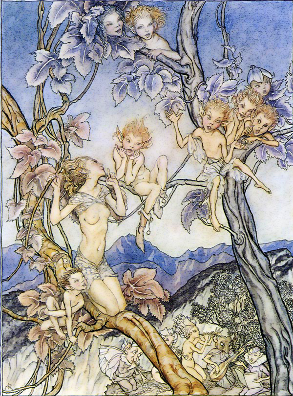 A fairy song, illustration d'Arthur Rackham pour A Midsummer Night's Dream publiée pa Heinemann en 1908, visible dans la Spencer Collection à la New York public Library, Etats-Unis